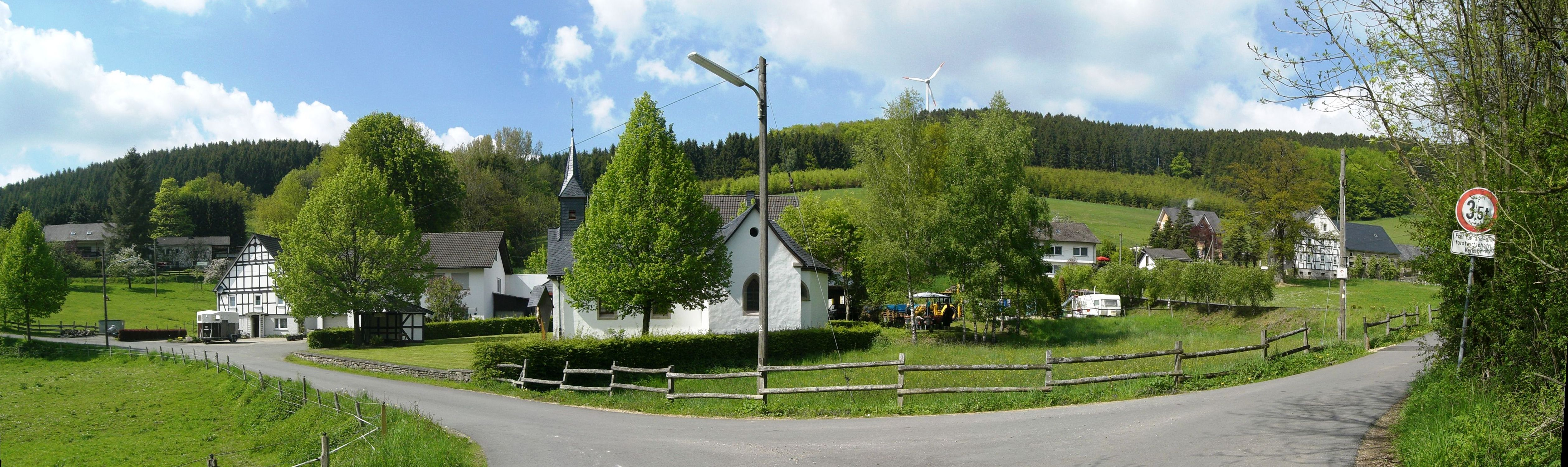 Blick auf das Dorf Obervalbert mit Kapelle im Mittelpunkt